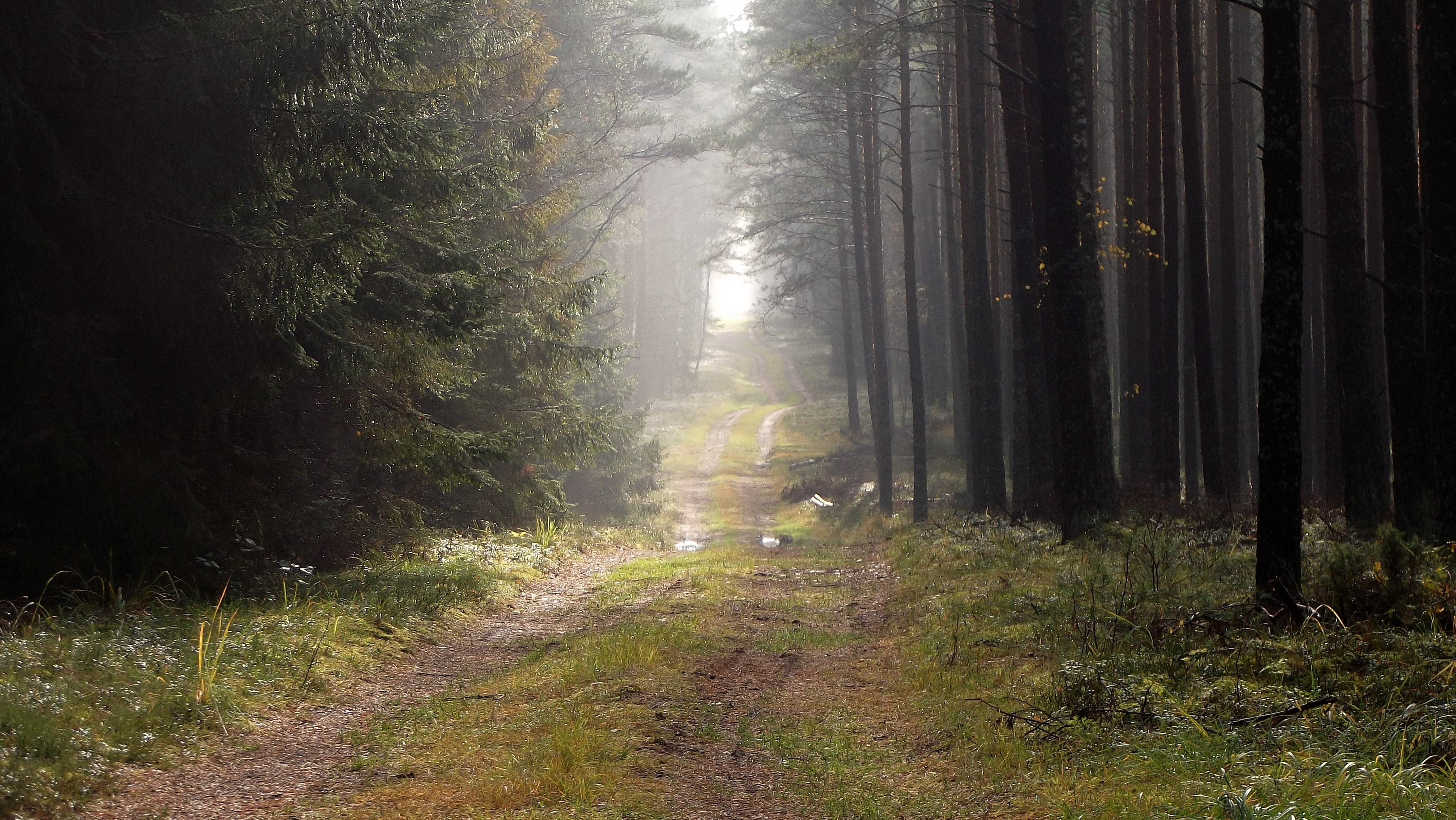 Obszar specjalnej ochrony ptaków: Puszcza Piska This is a photography of protected area with CRFOP ID PL.ZIPOP.1393.N2K.PLB280008.B